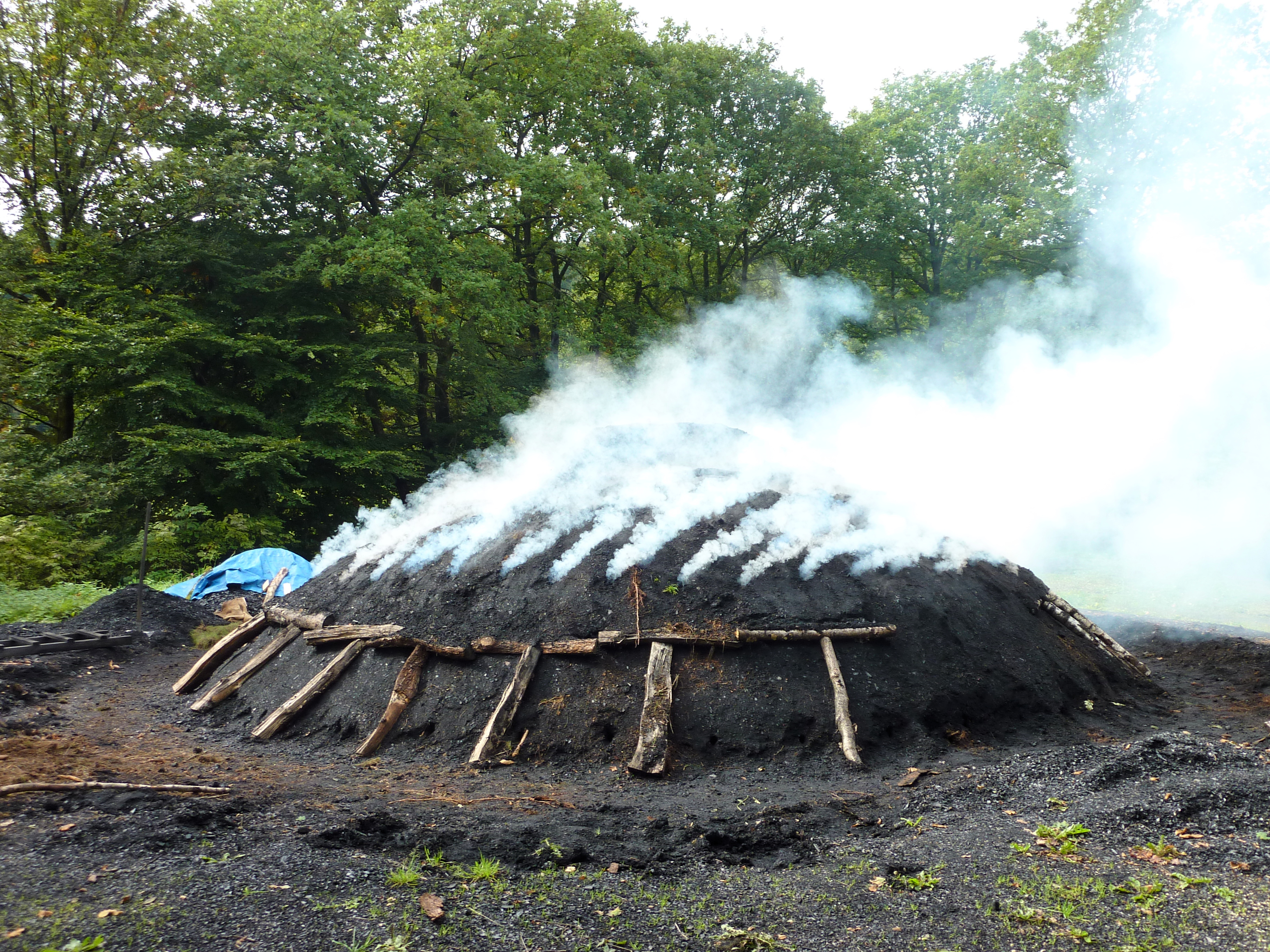 Gemeinde Walpersdorf (Netphen)/Westfalen: Nahe dem Ort wird nach traditioneller Art Holzkohle in Meilern durch kontrolliertes Abbrennen von jungen Birken-, Eichen- und Buchenstämmen hergestellt.